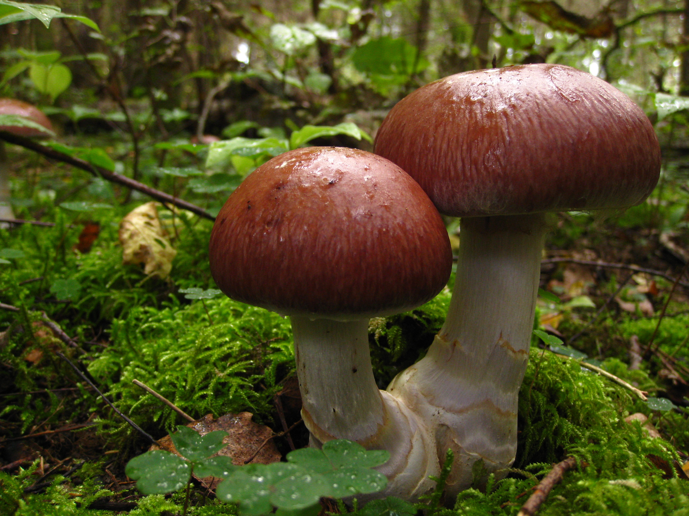 Hiidvöödik (Cortinarius praestans)